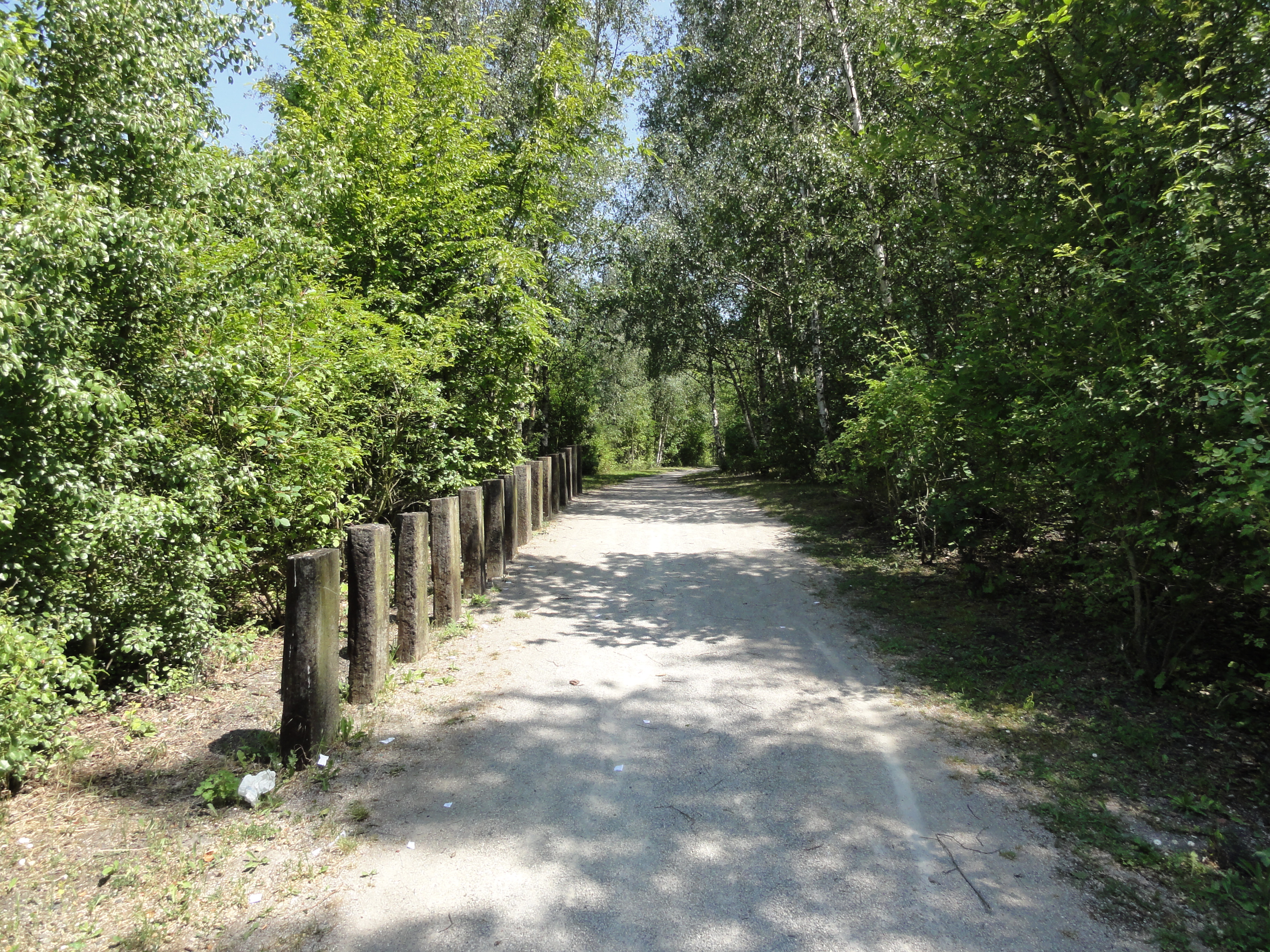 Terril n° 78A dit Cavalier du 15 de Lens, fosse n° 15 - 15 bis de la Compagnie des mines de Lens dans le bassin minier du Nord-Pas-de-Calais, Loos-en-Gohelle, Pas-de-Calais, Nord-Pas-de-Calais, France.